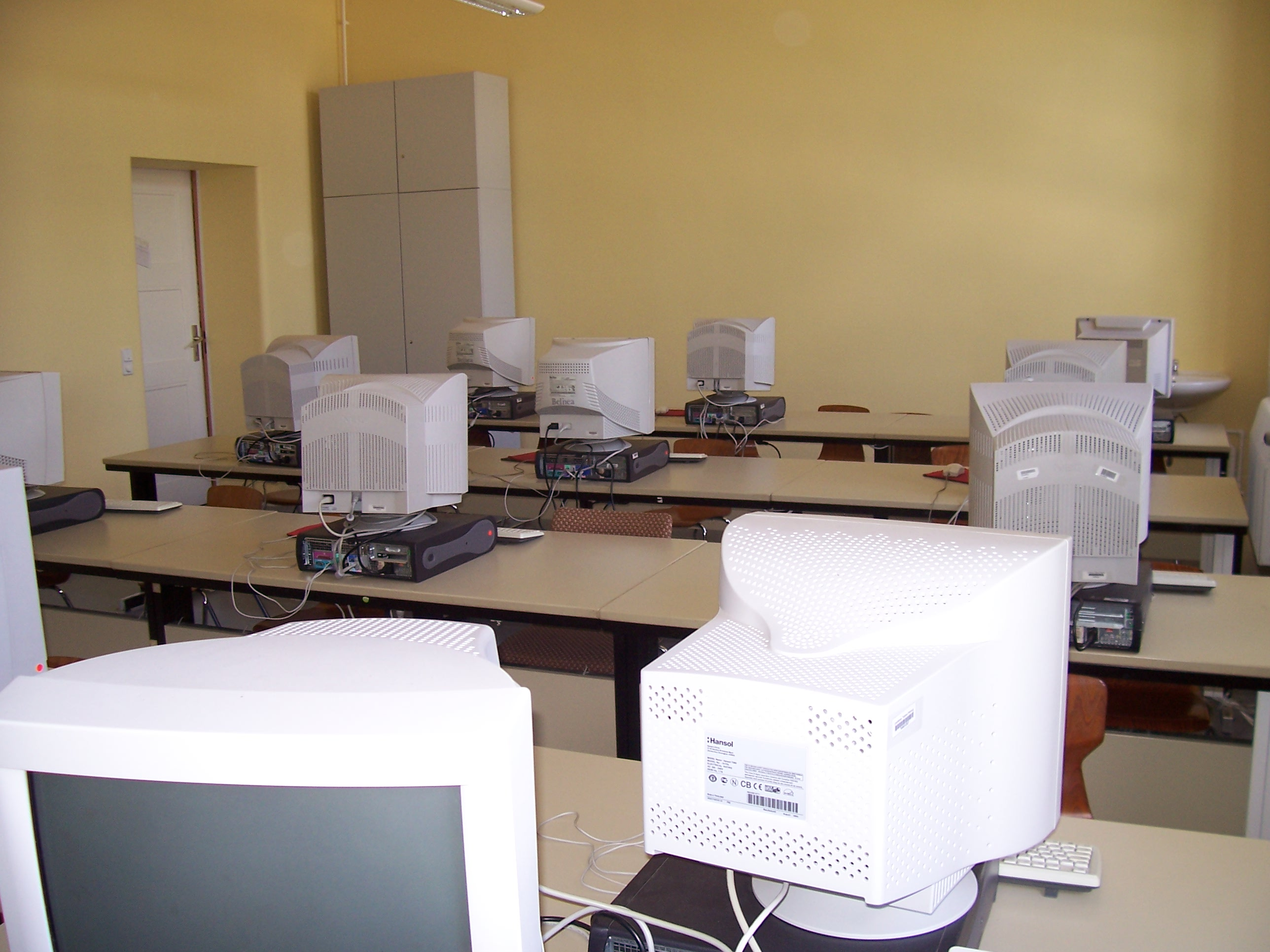 Computerkabinett des Goethegebäudes